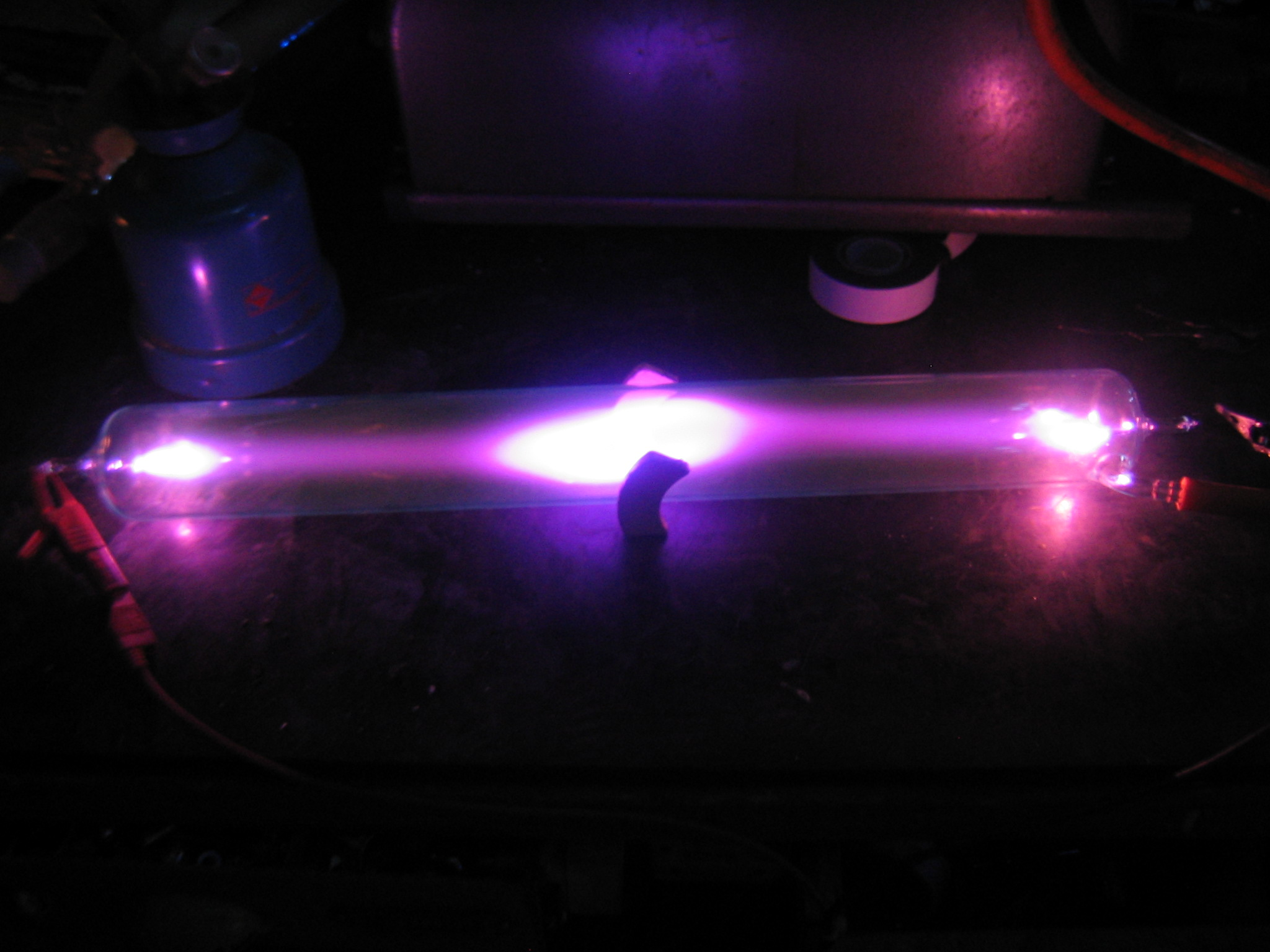 In ein Glasrohr, Länge 40cm, Durchmesser 5cm, sind zwei Platinelektroden eingeschmolzen und an einen Zündtrafo für eine Ölheizung angeschlossen (15kV 20mA) anschließend wurde das Rohr mit einer Hochvakuumpumpe evakuiert. In der Mitte sind zwei Magnete installiert, welche das Plasma auseinander drücken. Autor: Gerd Domrath (eigenes Bild)